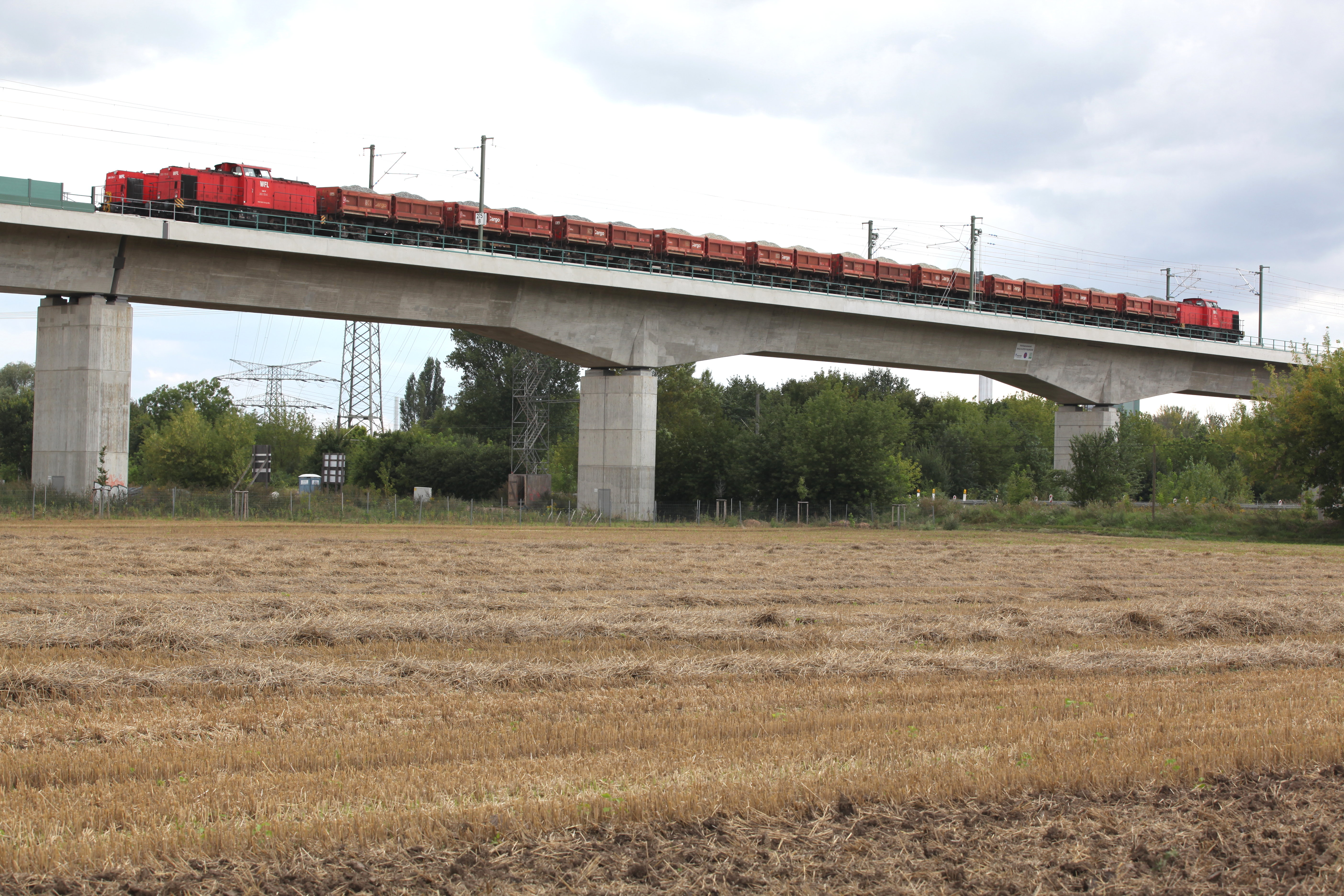 Lastenzug